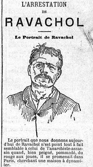 Portrait de Ravachol - Le Figaro du 1er avril 1892